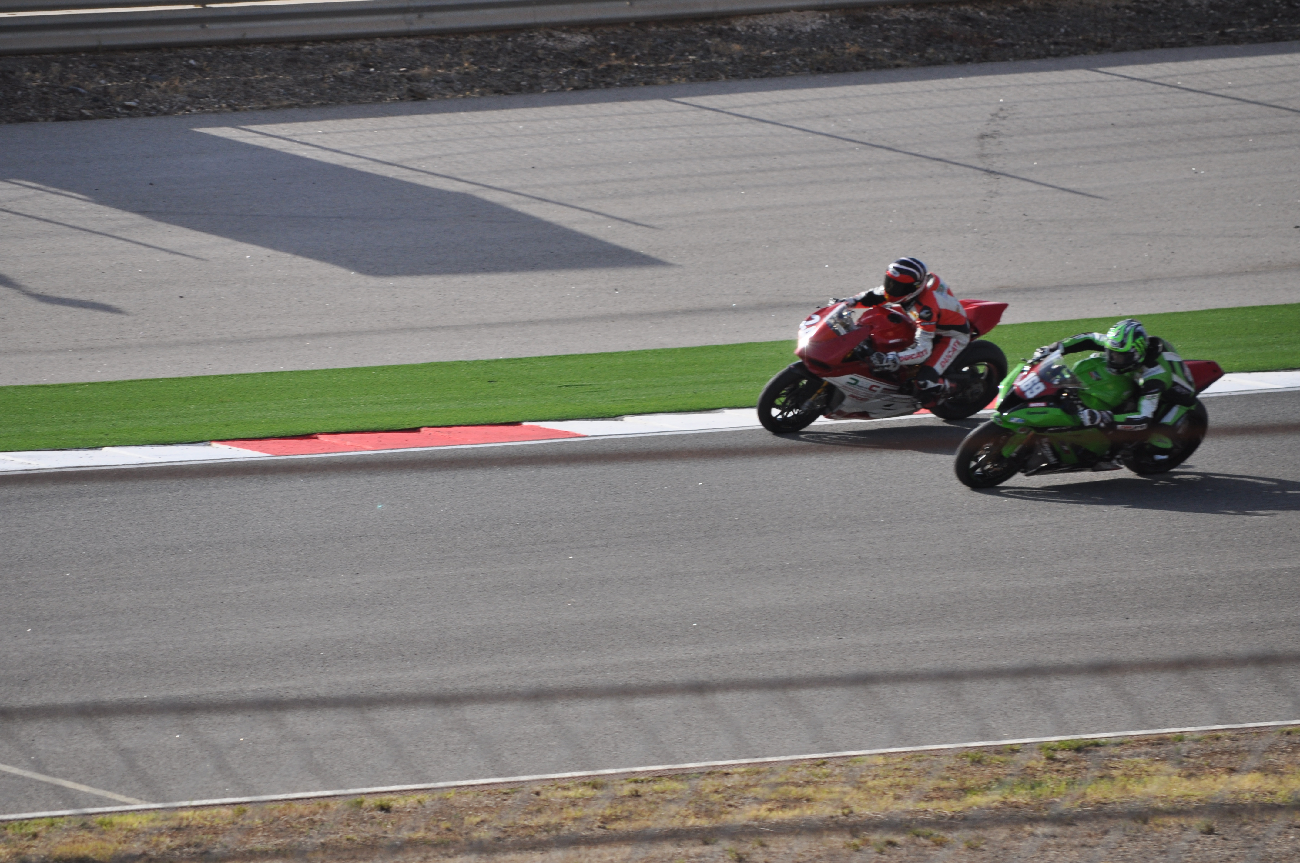 Super Stock 1000, Autodromo do Algarve (AIA) 2012